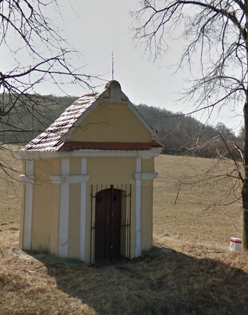 Kaplička, st. 69, Kotojedy.